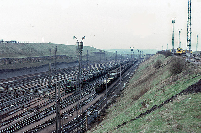 Tinsley Yard